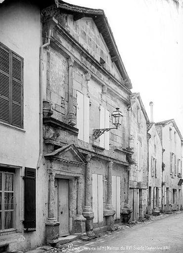 Façade sur rue.